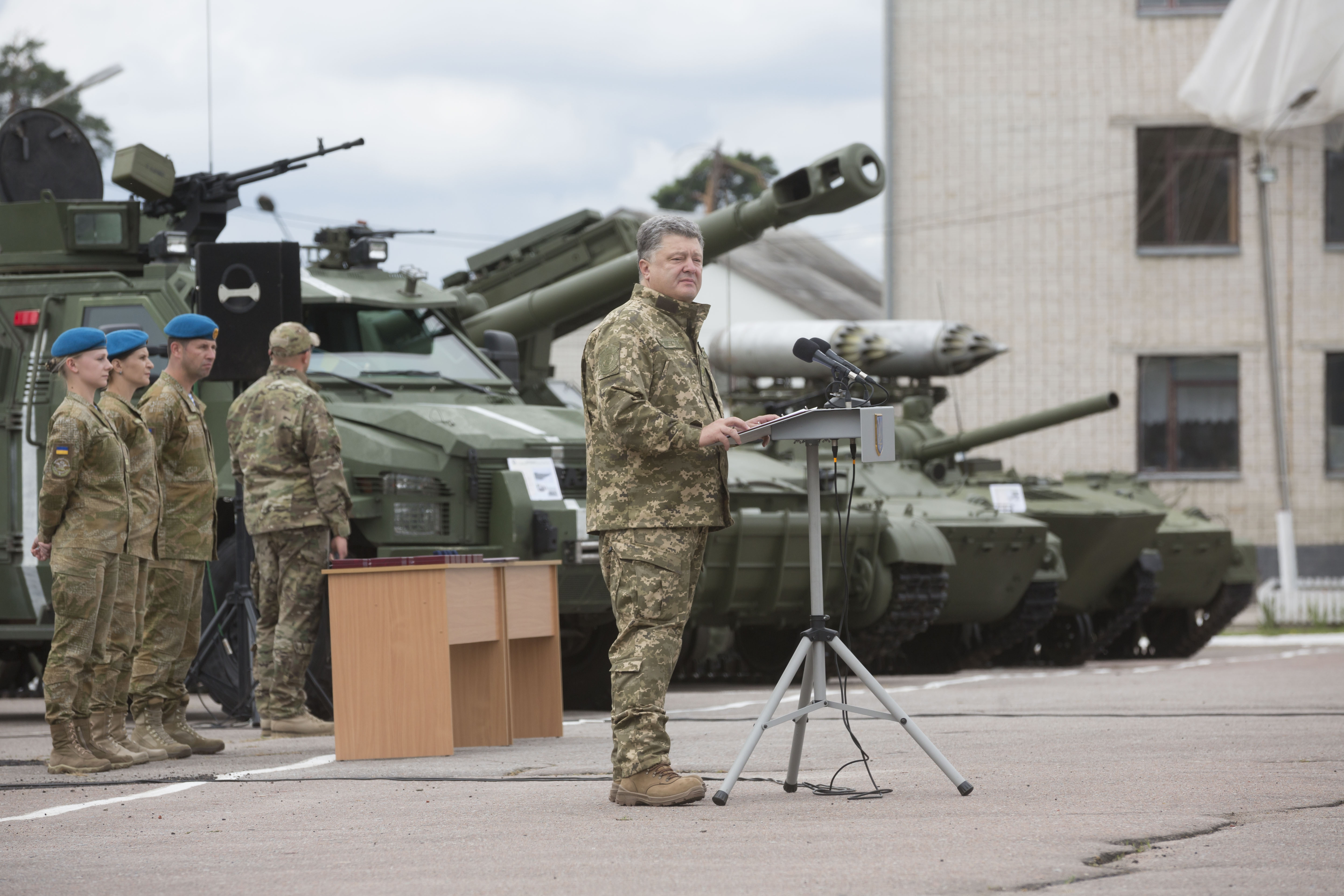 Робоча поїздка до Житомирської області